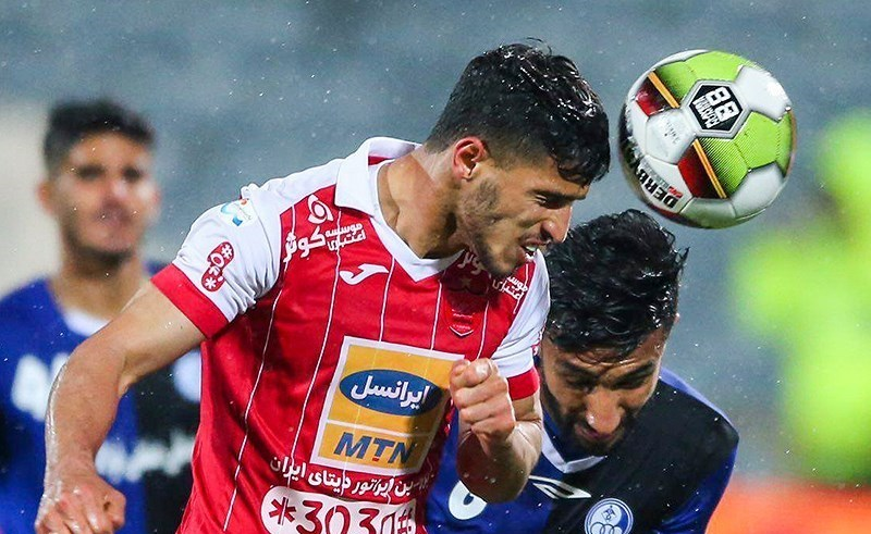 علی علیپور در مسابقه پرسپولیس و استقلال خوزستان